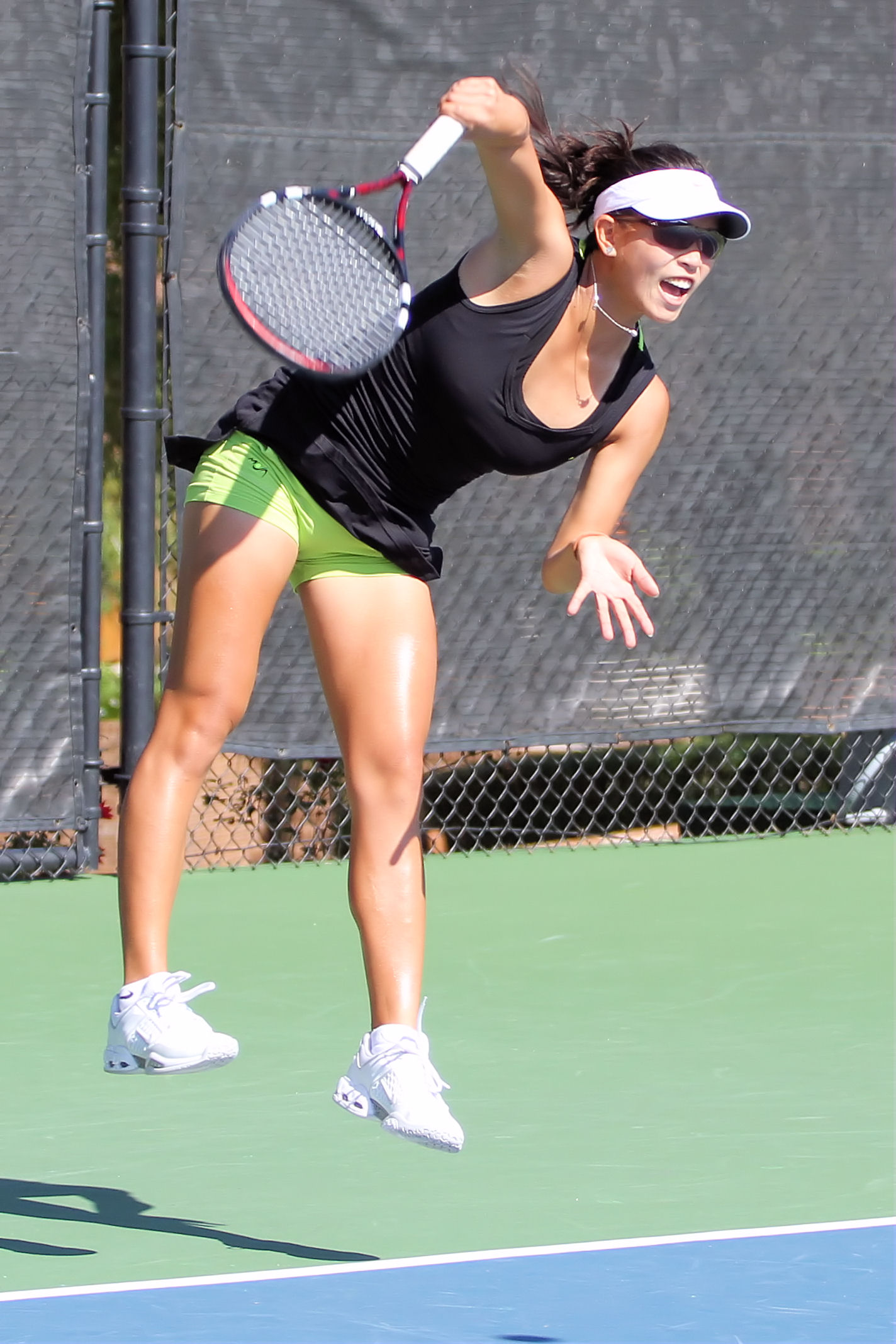 Stefanie Tan (SIN)